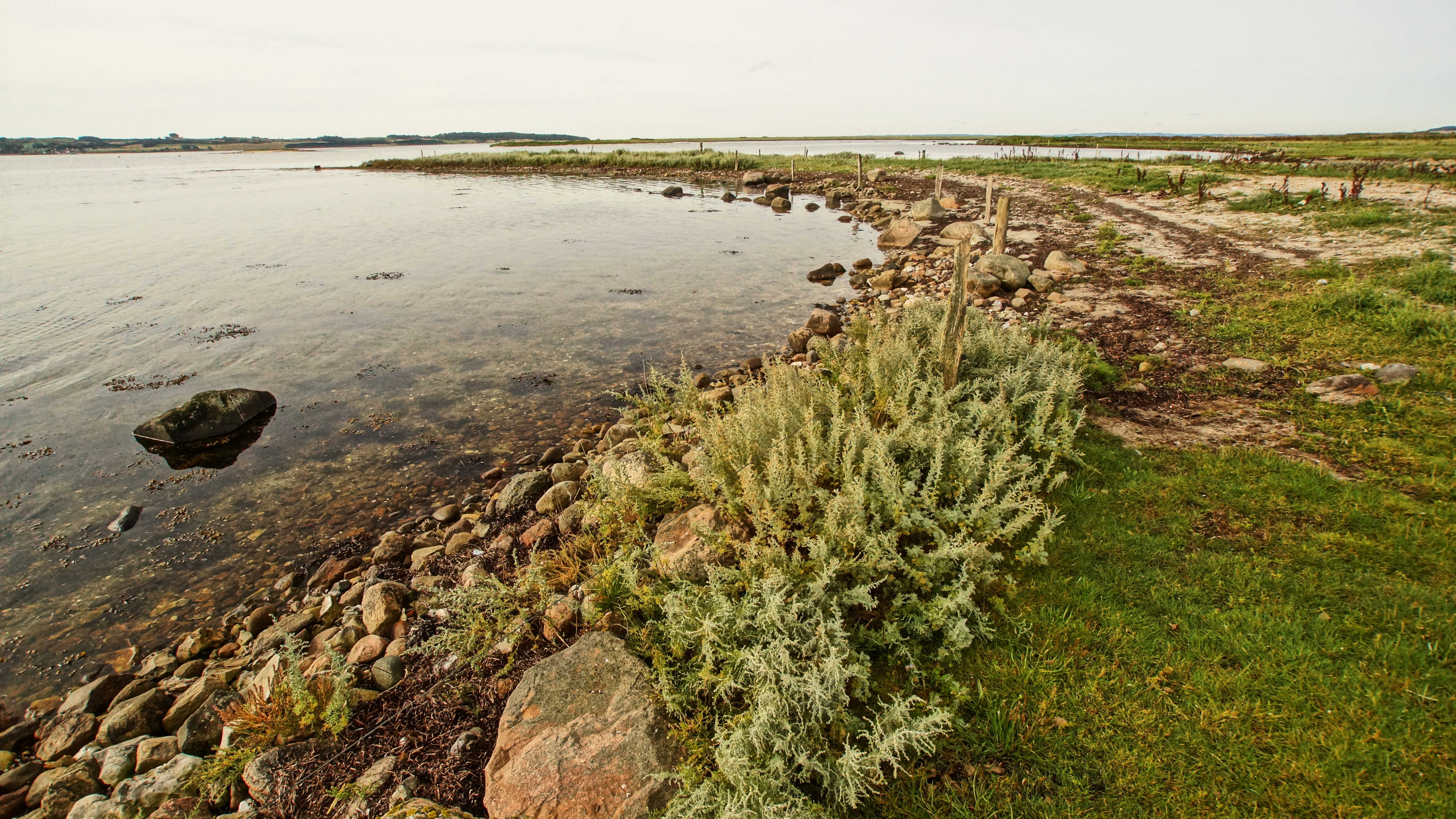 Strands Gunger, nordsiden af Begtrup Vig